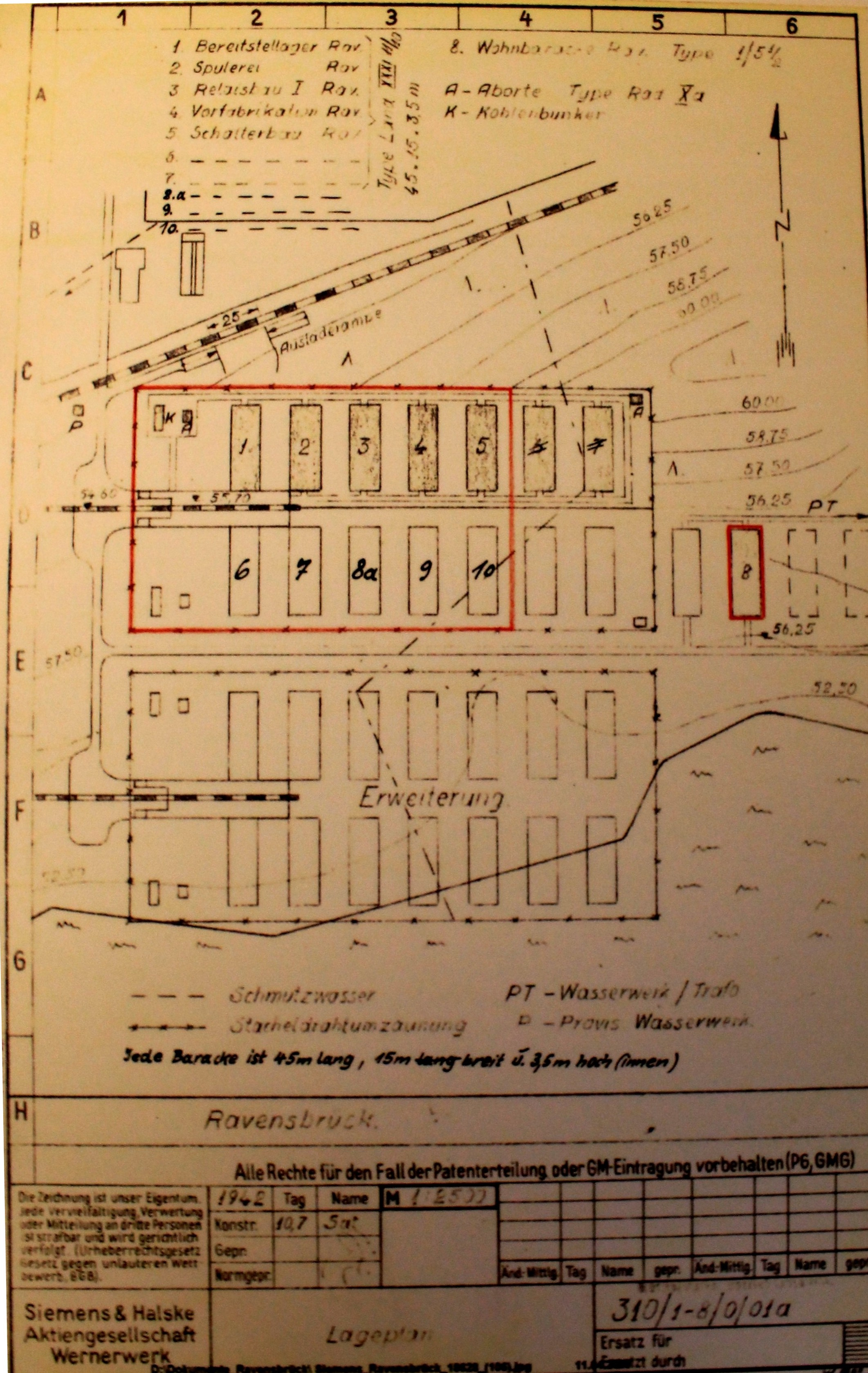 Erweiterung des Siemens Lagers, Zeichnung von Siemens & Halske, Werner Werk vm 10.7.1942